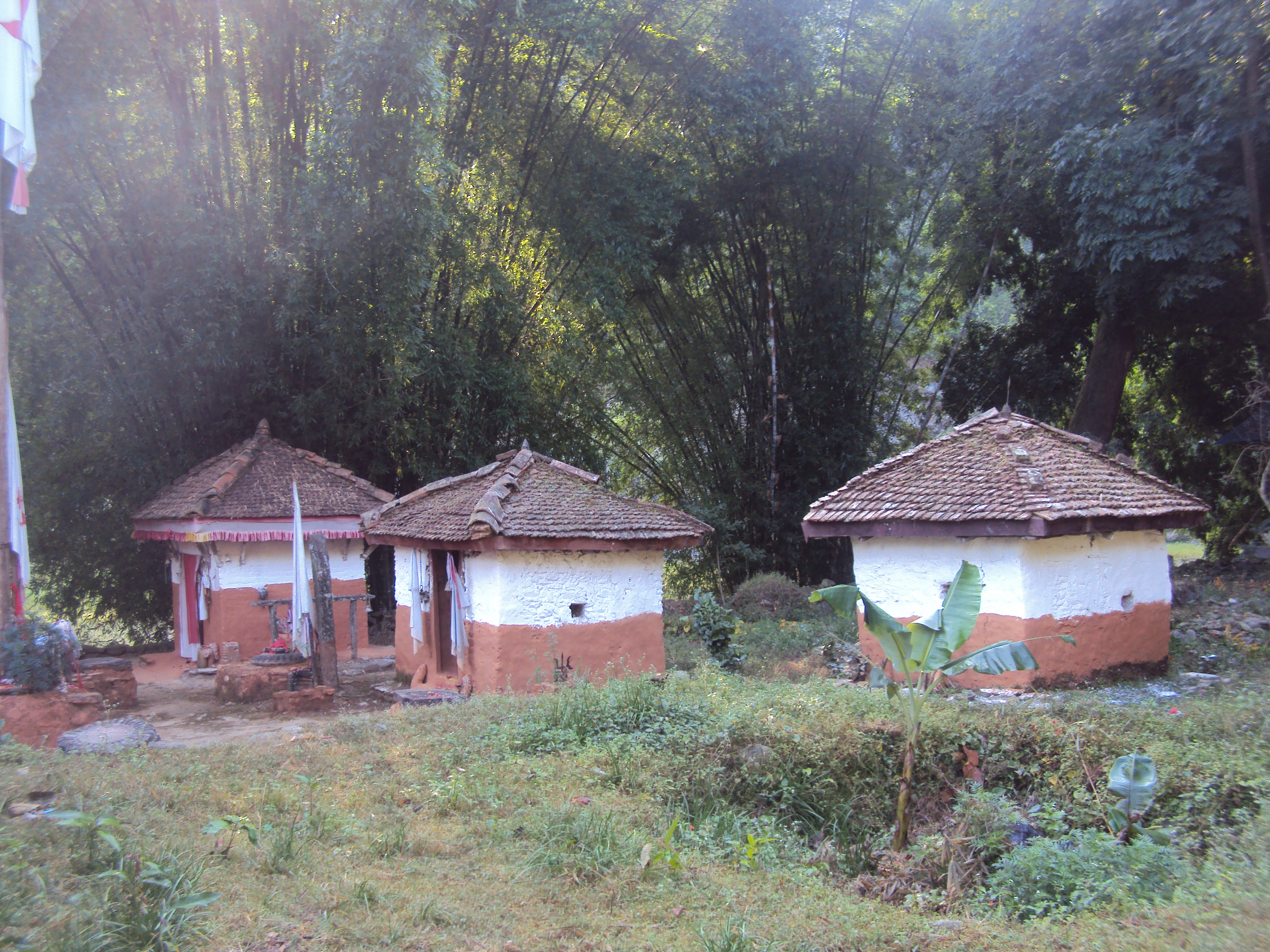 नेपाली: नाभिस्थान मन्दिर दैलेख